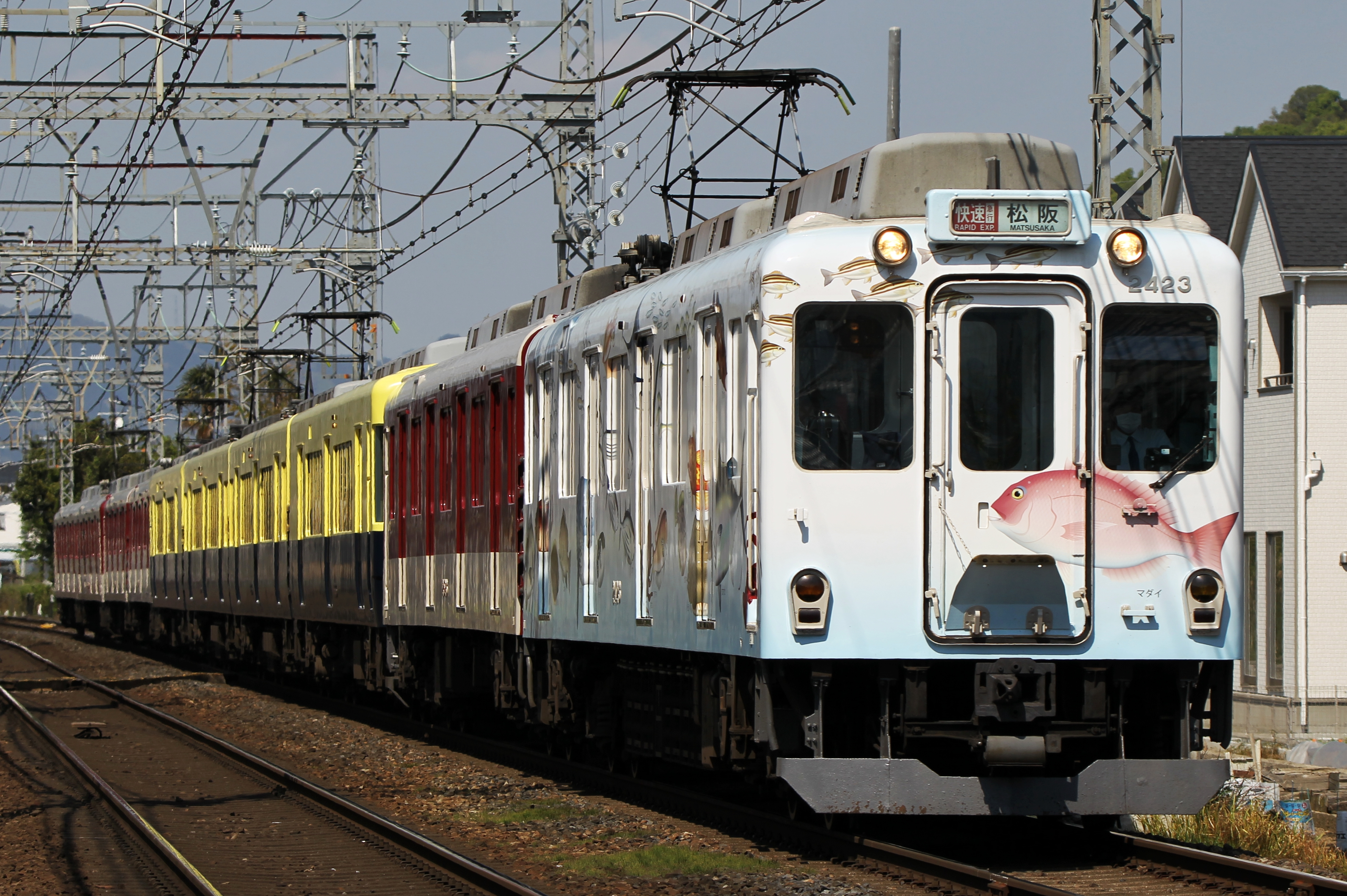 近鉄大阪線 快速急行松阪行き 2410系W23(伊勢方1両鮮魚運搬車両 伊勢志摩お魚図鑑)2両+5200系VX05(復刻塗装)4両+2410系2両+2410系2両 の10両編成 耳成駅 - 大福駅間にて